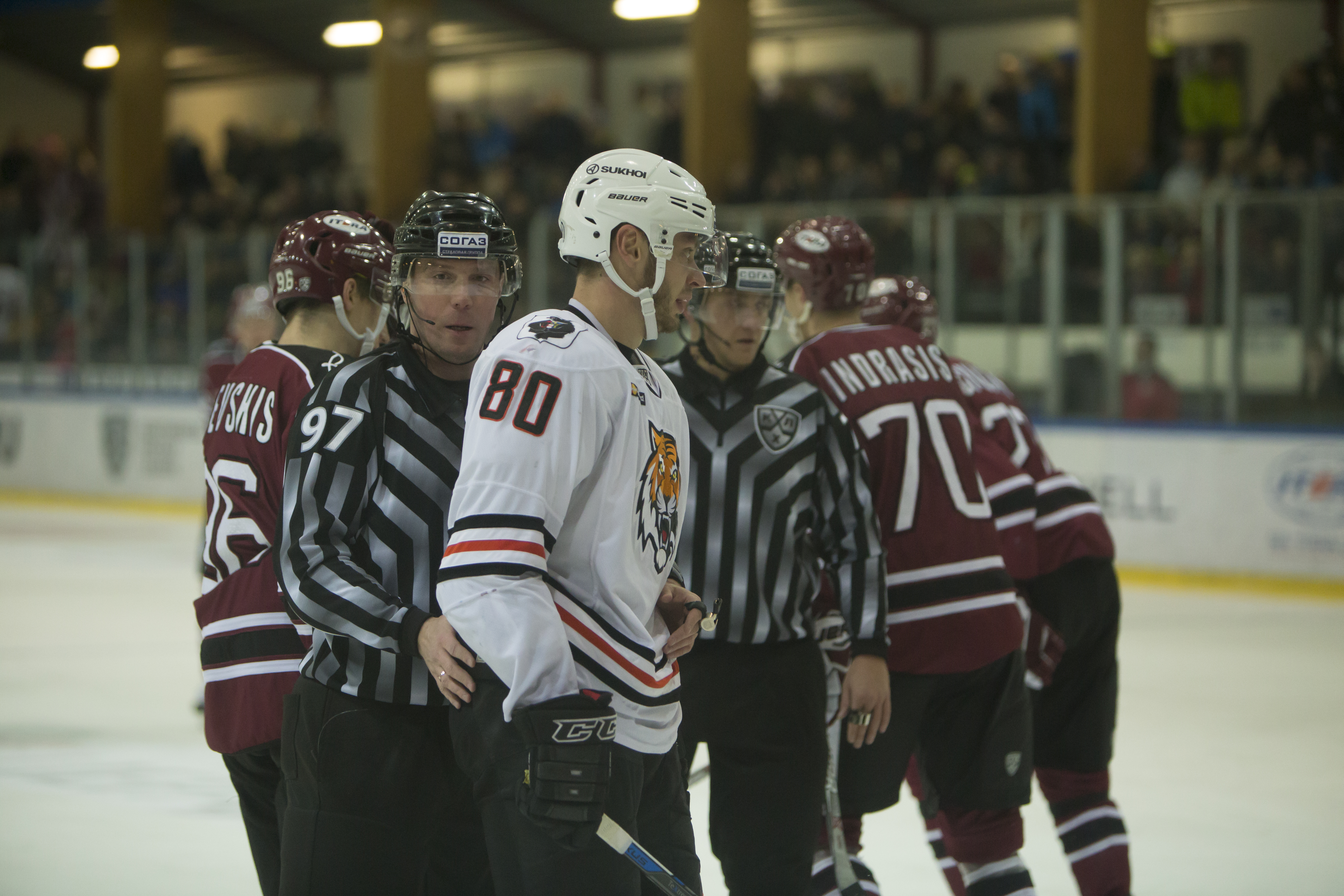 Dinamo Riga vs. Amur Khabarovsk 3:2, Liepājā, KHL, 2016-11-10